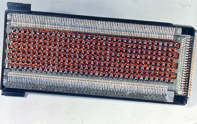 Apollo Guidance Computer (Ringkernspeicher)